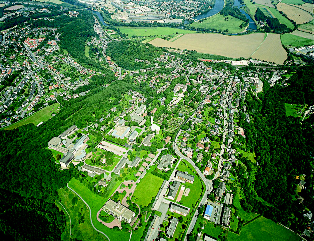 Die Evangelische Stiftung Volmarstein heute - aus der Luft.